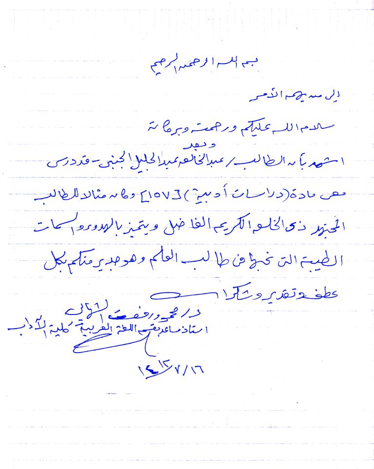 شهادة الدكتور محمود الشهابي عضو هيئة التدريس بجامعة الملك عبد العزيز بجدة بحق تلميذه عبد الخالق الجنبي.